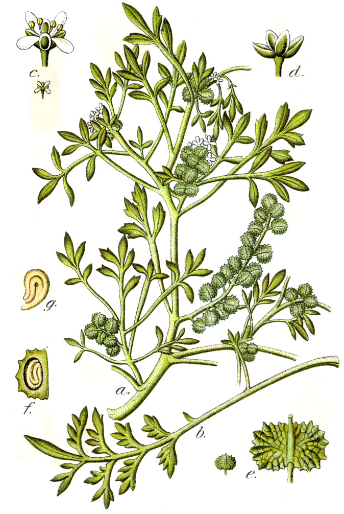 Lepidium squamatum Forssk., syn. Coronopus squamatus (Forssk.) Asch., Lepidium coronopus (L.) Al-Shehbaz, Crucifera ruellii (All.) E.H.L.Krause Original Caption Ruellius-Kresse, Crucifera ruellii